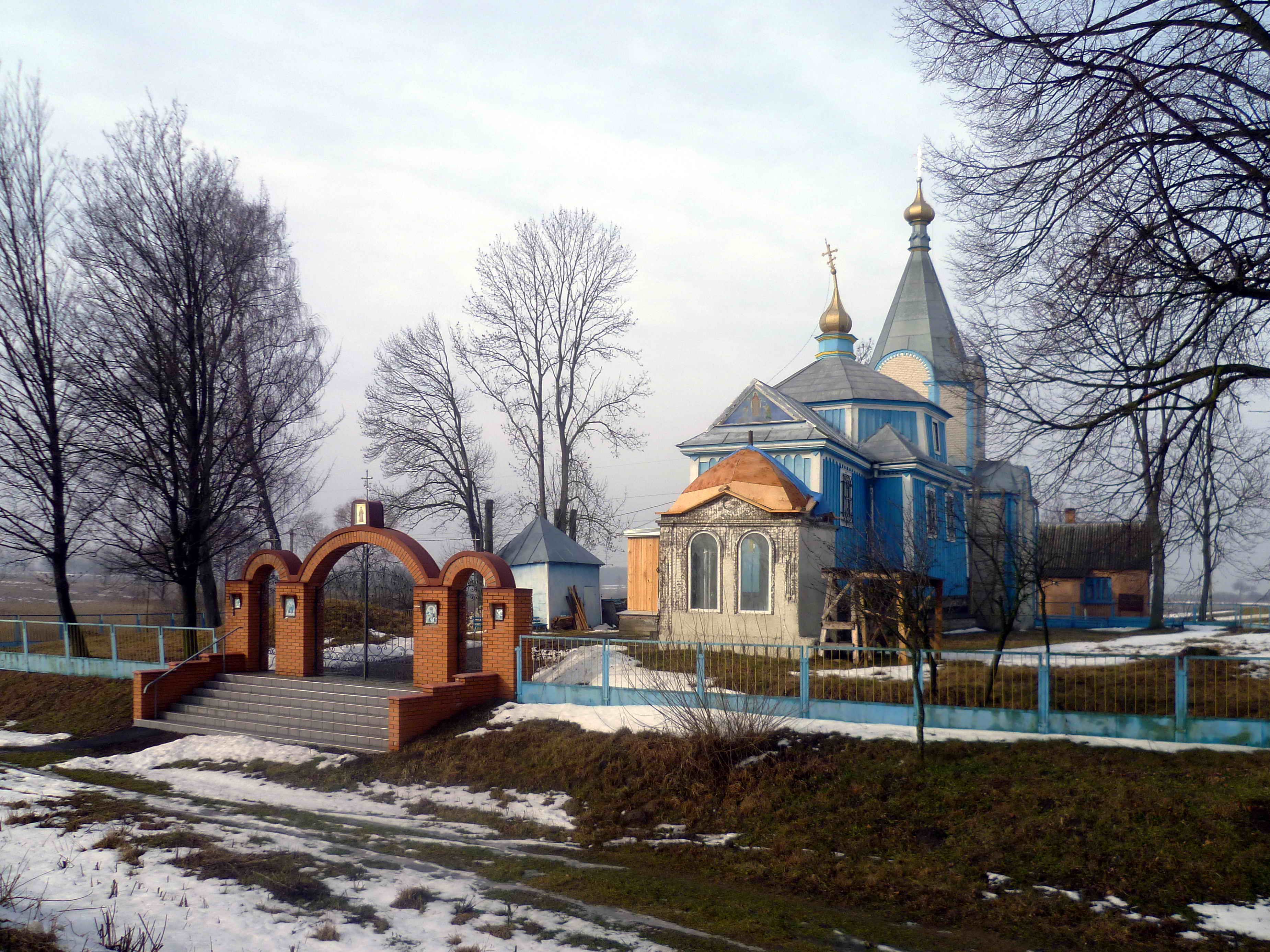 Церква Св. Стефана (дер.) (1795 рік) - загальний вигляд з дороги - с.Усичі Луцький район Волинська область Україна